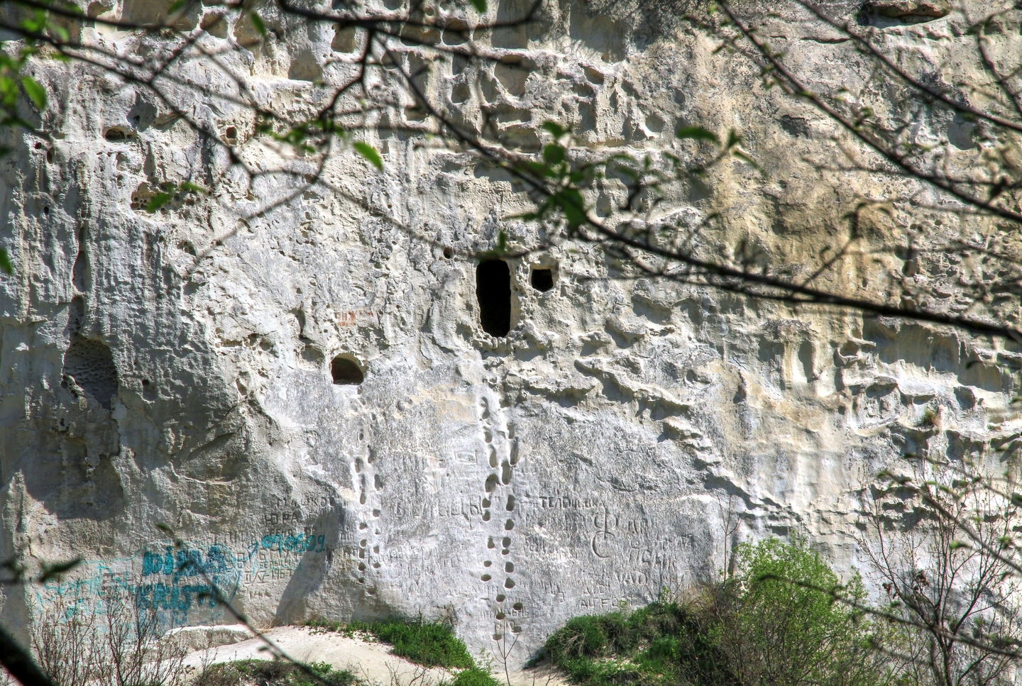 Овраг «Бекиров яр», монумент природы, находится в Сорокский район, Южнее с. Сорока, лесничество, урочище Застынка-II, квартал 24 (код MD-SR-mn.A-066) A-066